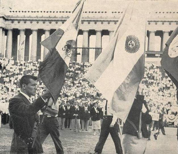 mario tovar abanderado de la delegacion deportiva mexicana en los III Juegos Deportivos panamericanos Chicago 1959